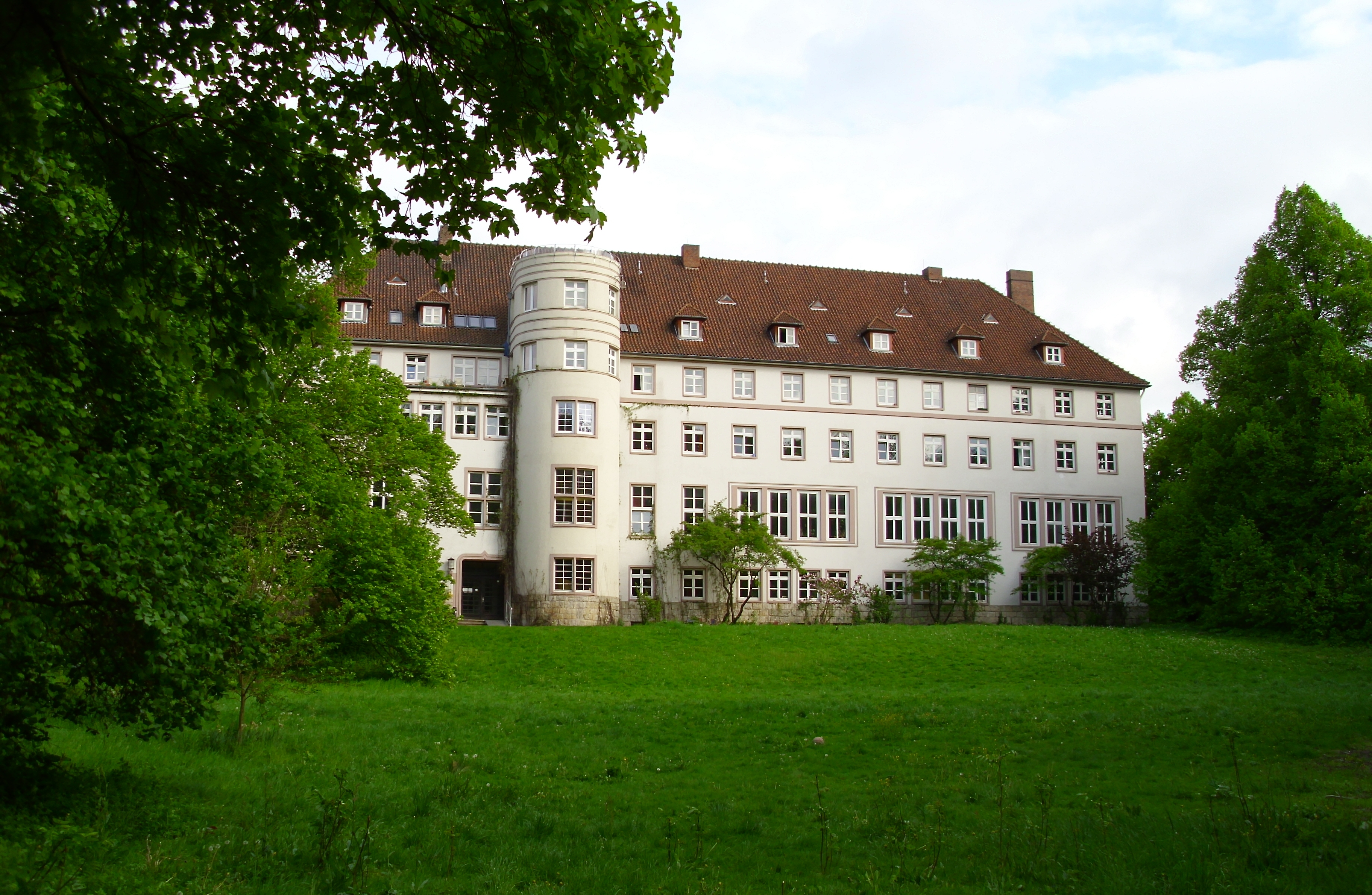 Der Steinbergstraße zugewandte Fassade des Trillke-Guts, Hildesheim im Mai 2011